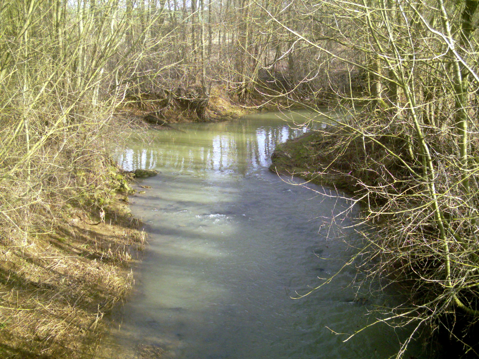 Ruisseau de l'Amezule près du carrefour des siphons sur la commune d'Eulmont